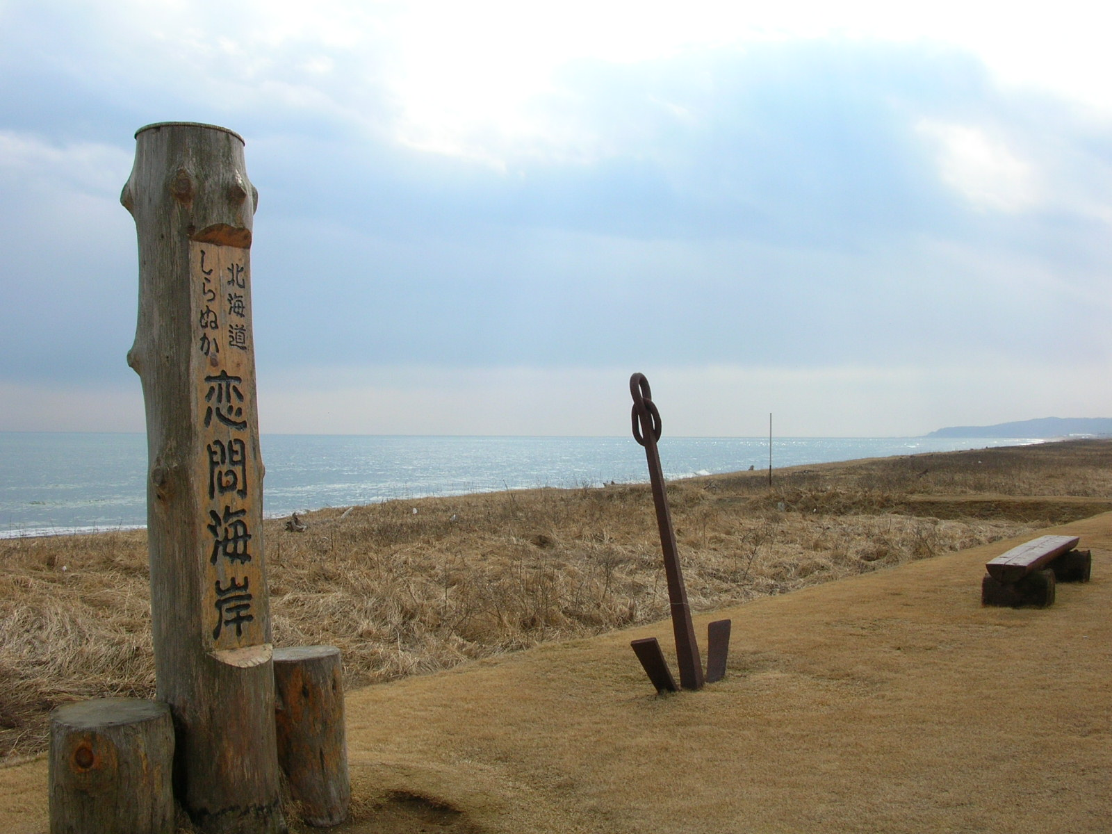 恋を問う（Koitoi Beach)